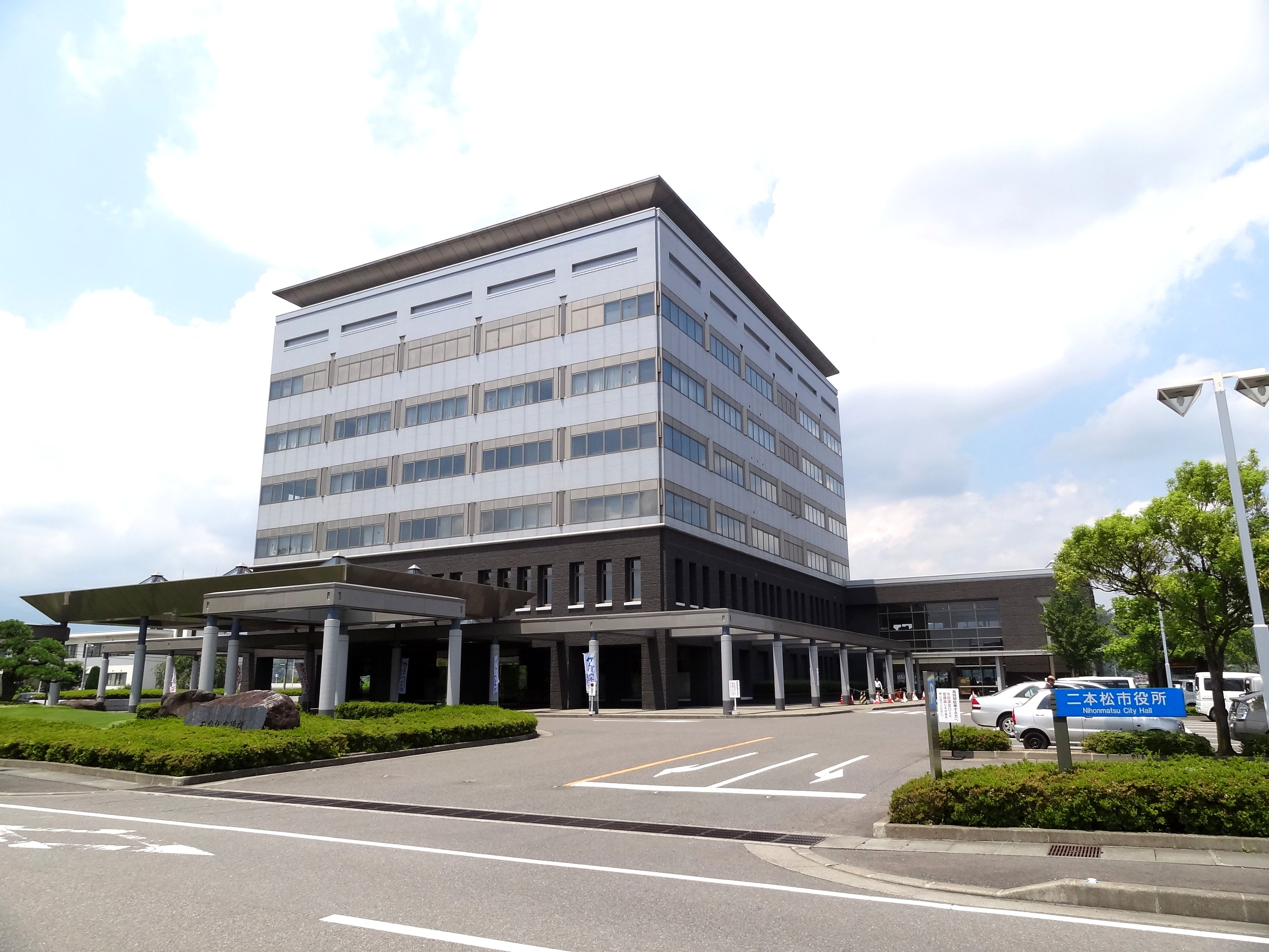 二本松市役所